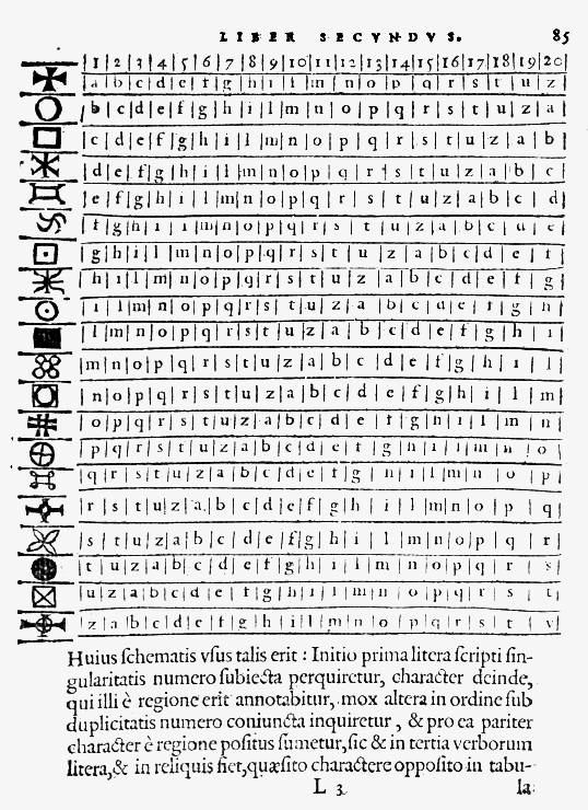 Une page de De futivis literarum notis, Della Porta